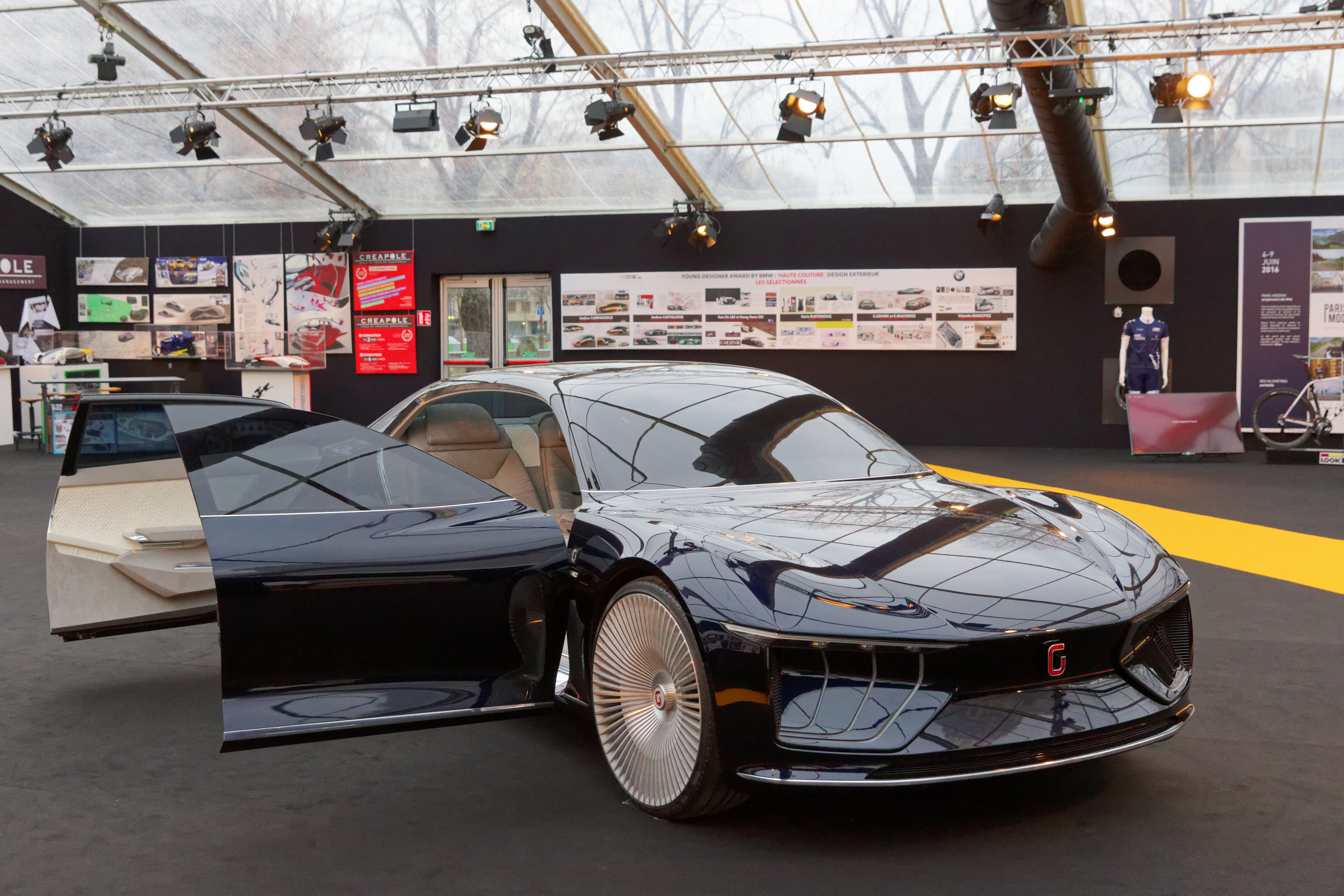 La Giugiaro GEA Concept exposée lors du festival automobile international 2016.